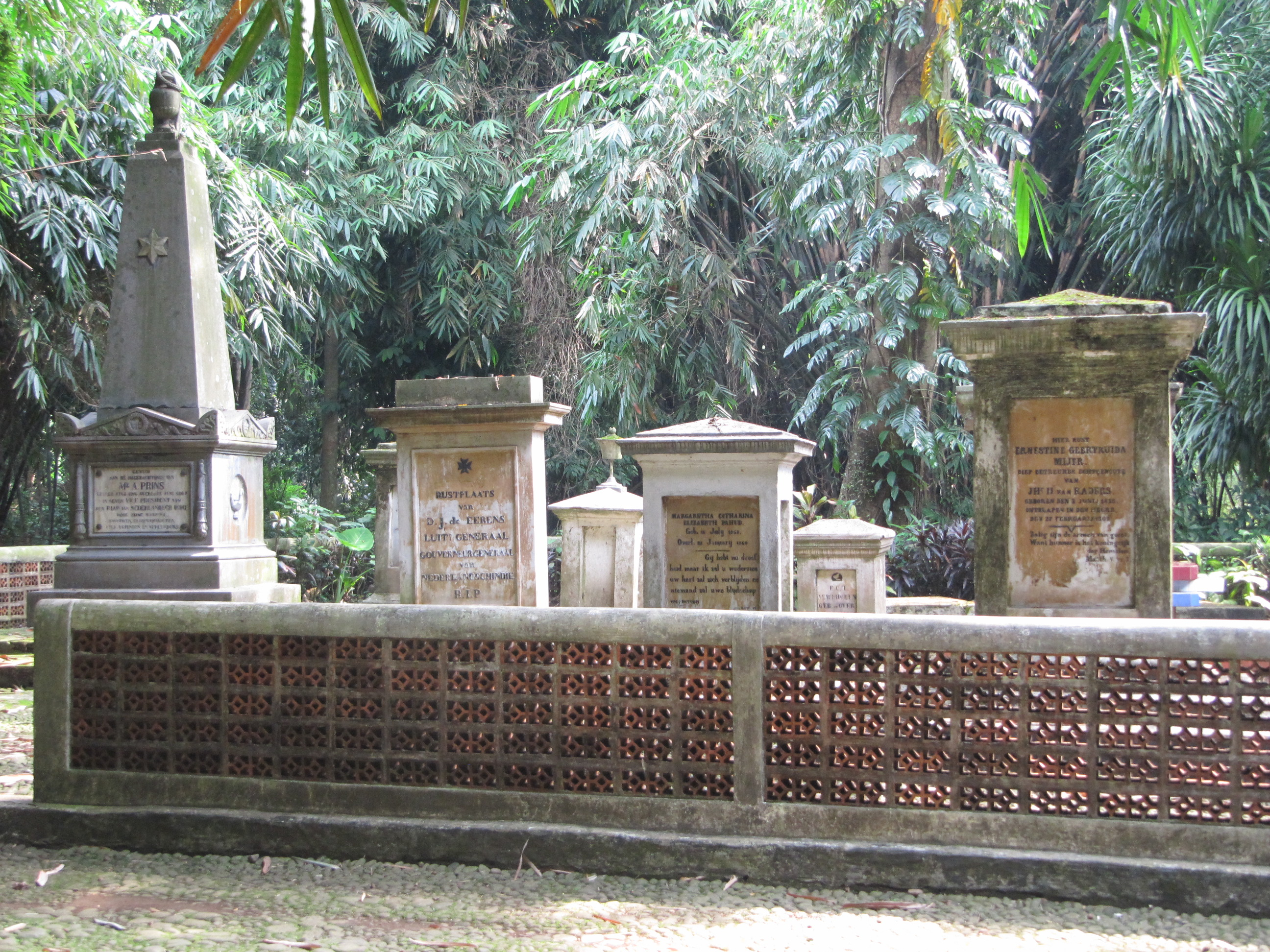 diverse graven (Prins, Dominique Jacques de Eerens, Margarita Catharina Elizabeth Pahud, Ernstine Geertruida Mijer) op Makam Belanda, Bogor